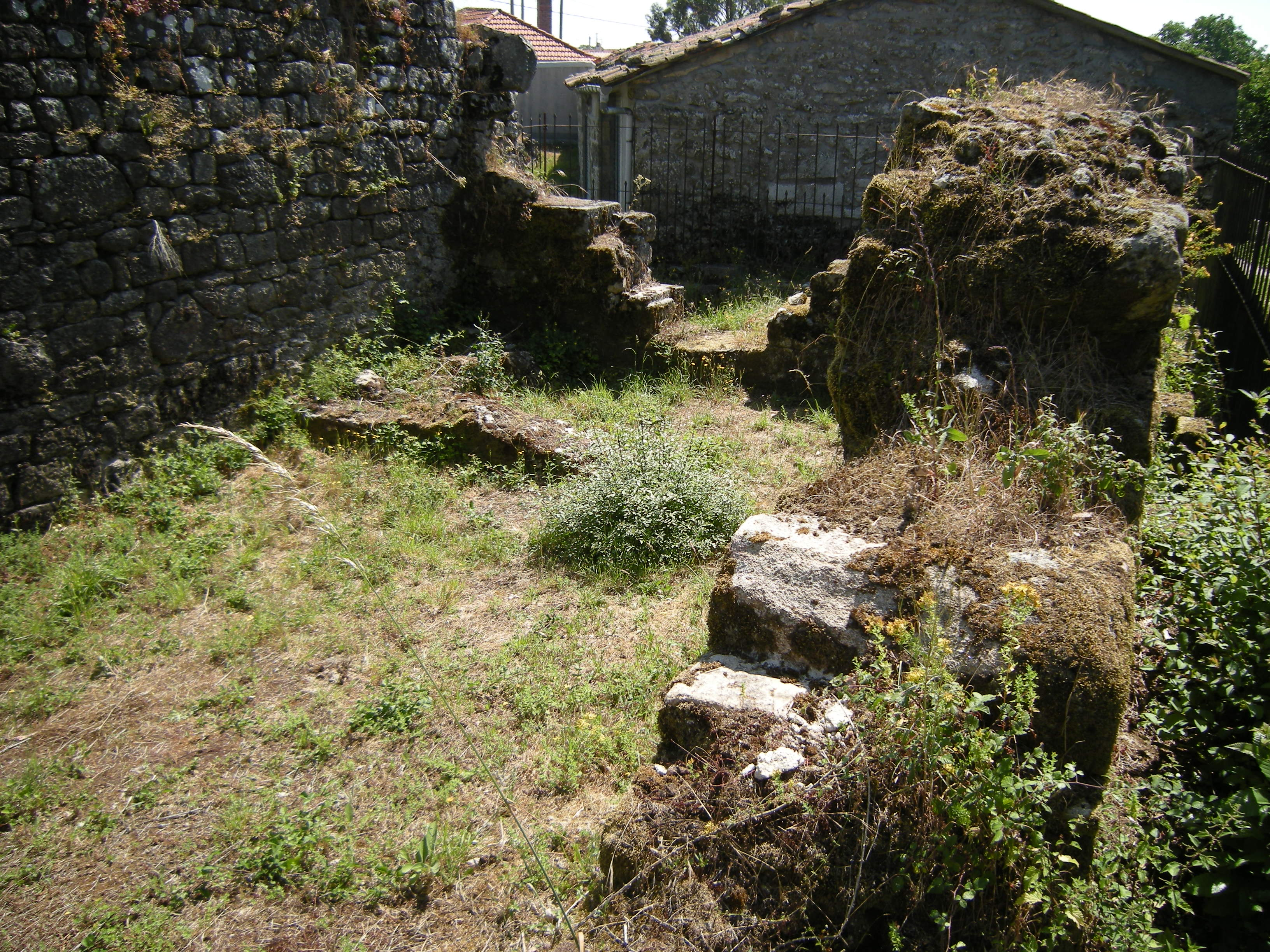 Xacemento paleocristián de San Breixo "O Santo Vello", na aldea de Ouvigo (Os Blancos)